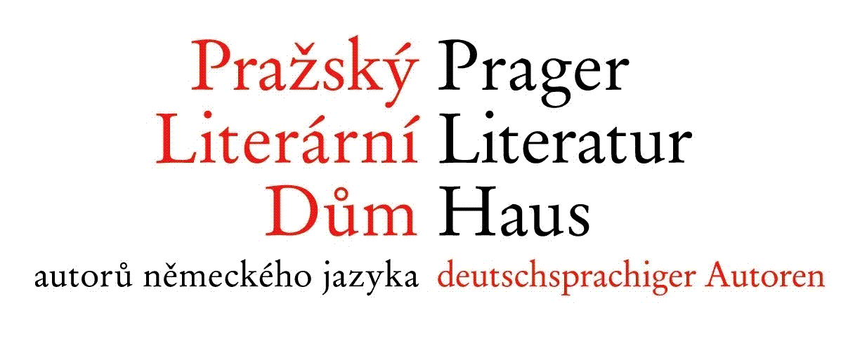 Logo Pražského literárního domu